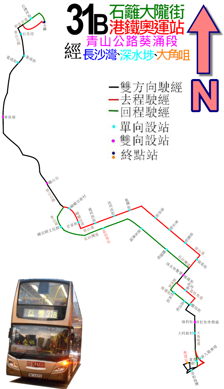 中文（香港）: 九巴31B線的走線圖